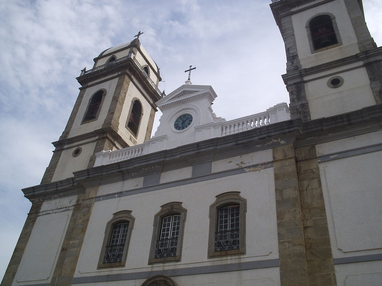 Basilica de Nossa Senhora das Neves e Bom Jesus de Iguape